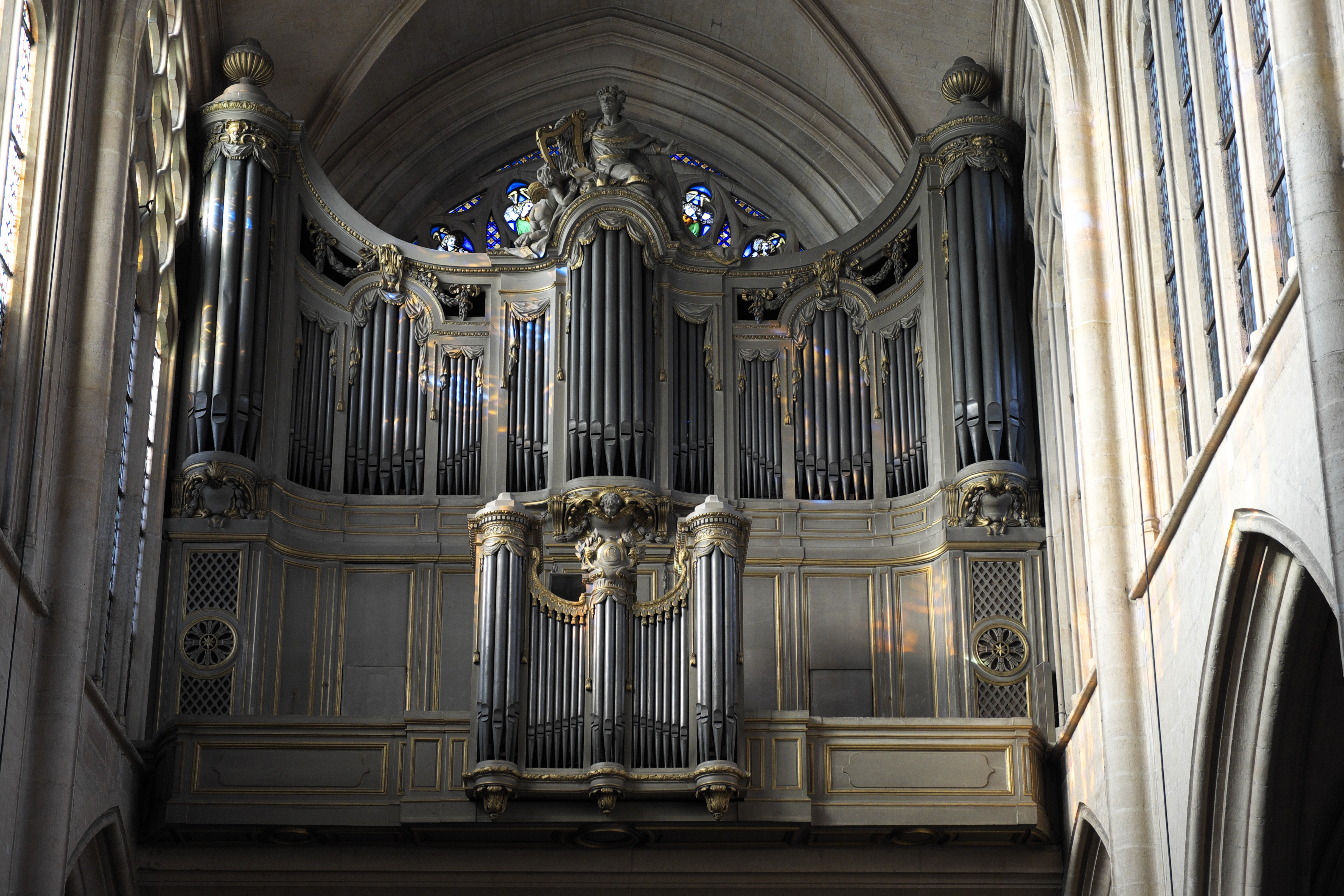 Katholische Pfarrkirche St-Germain-l’Auxerrois im 1. Arrondisseement in Paris, Orgel von François Henri Clicquot, Pierre François Dallery; Orgelprospekt von Pierre Noël Rousset und Lavergne; aus dem dritten Viertel des 18. Jahrhunderts